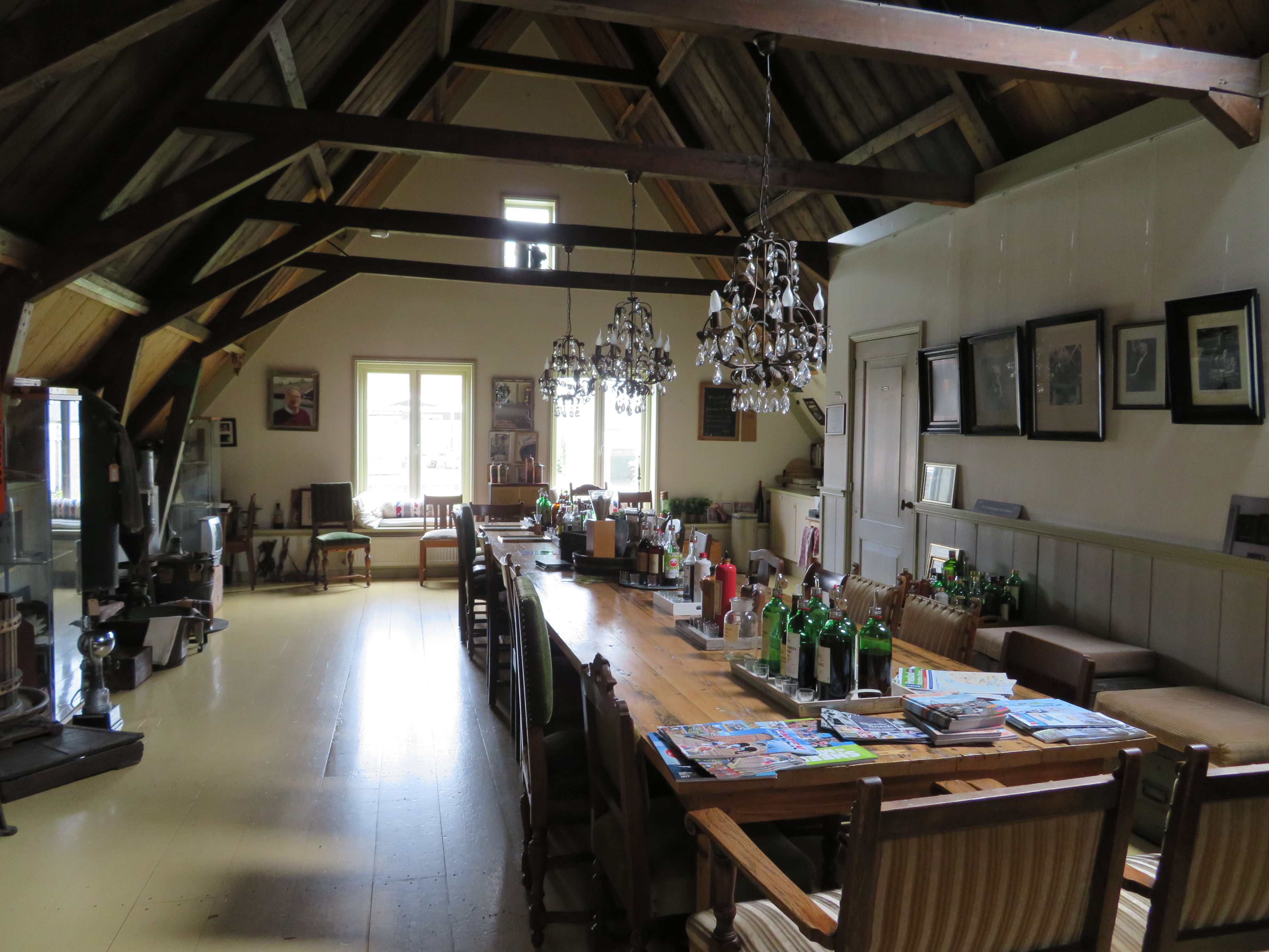 Proeflokaal van het pand aan het Kleinzand in Sneek van Weduwe Joustra